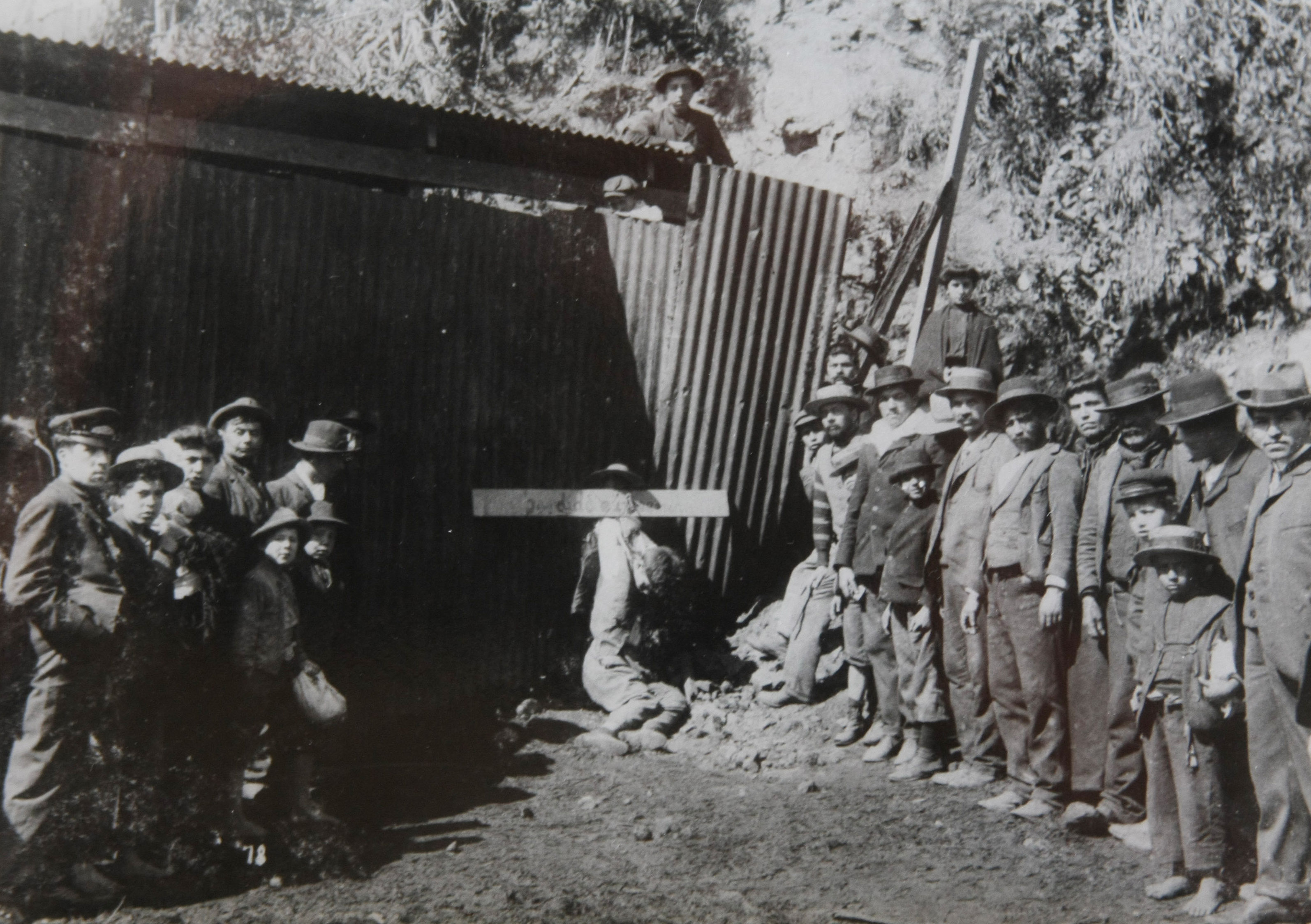 Terremoto de Valparaíso de 1906. Saqueador fusilado al pie de un cerro porteño. Un letrero indica su delito.